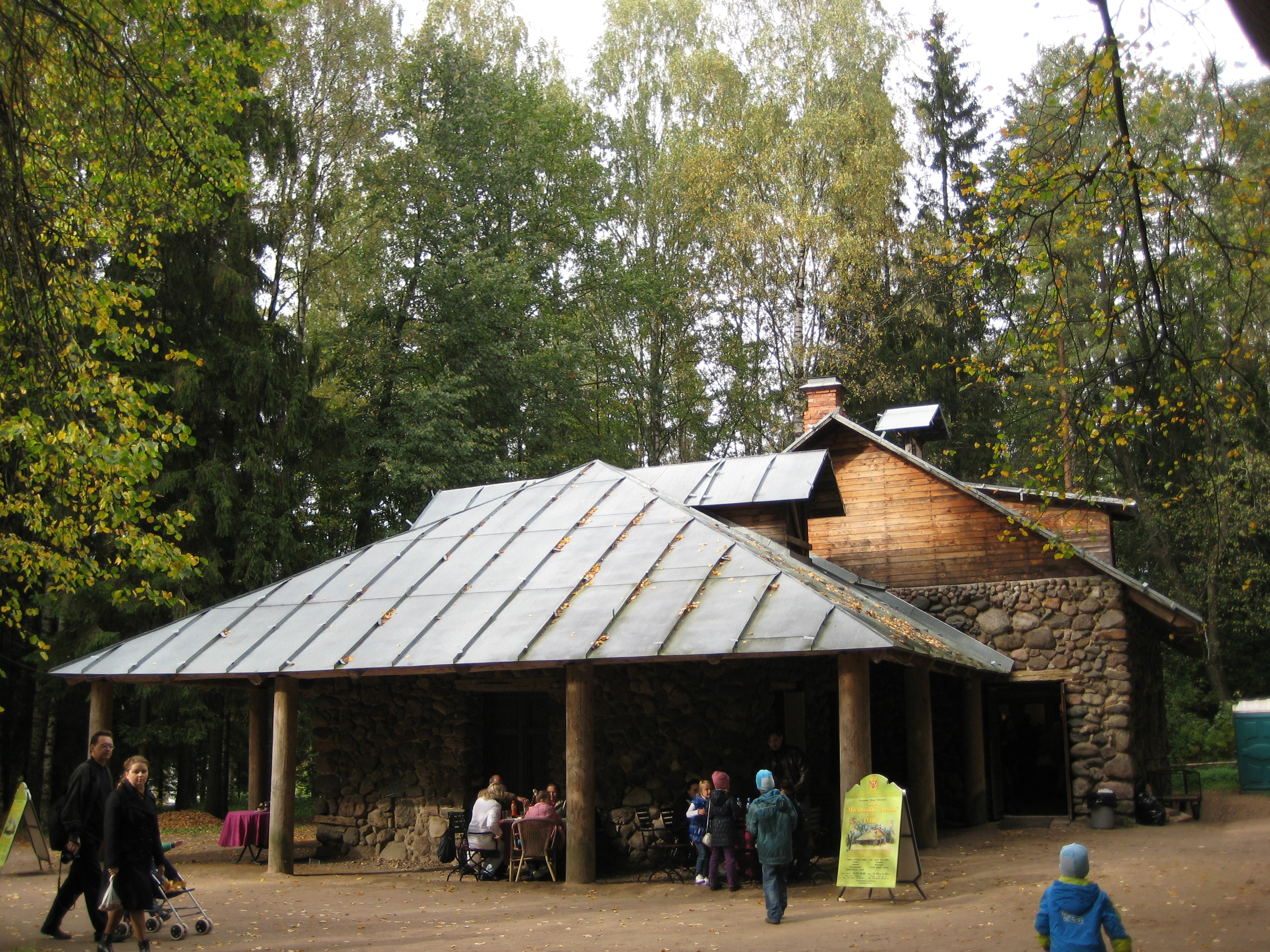 Павловск. Павильон "Молочня".